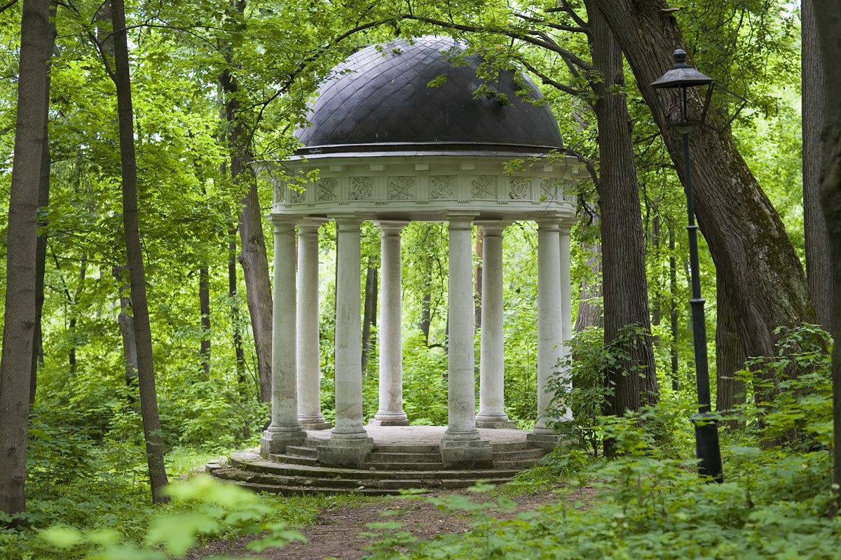 Беседка "Храм Венеры"